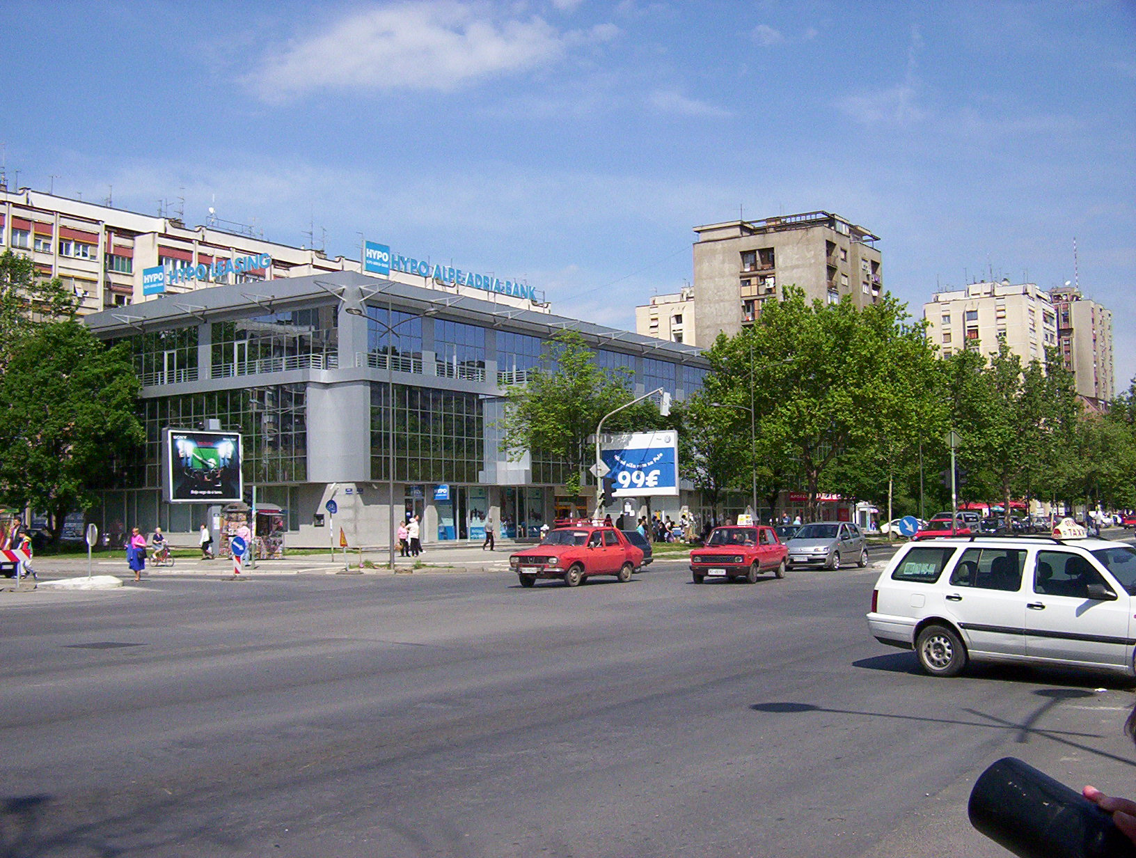 Bulevar oslobođenja, Novi Sad